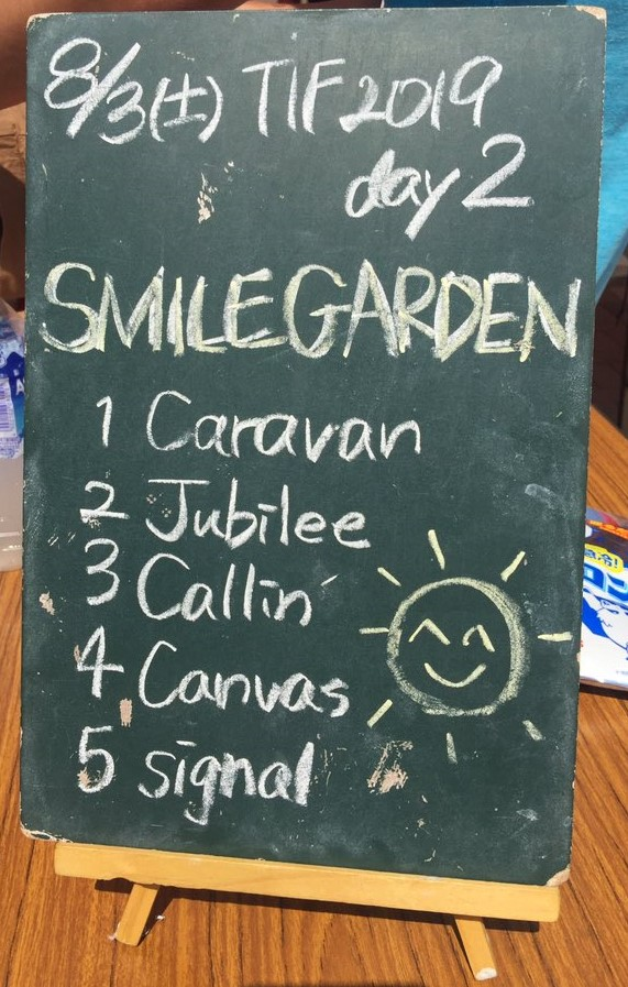 amiinAセトリボード